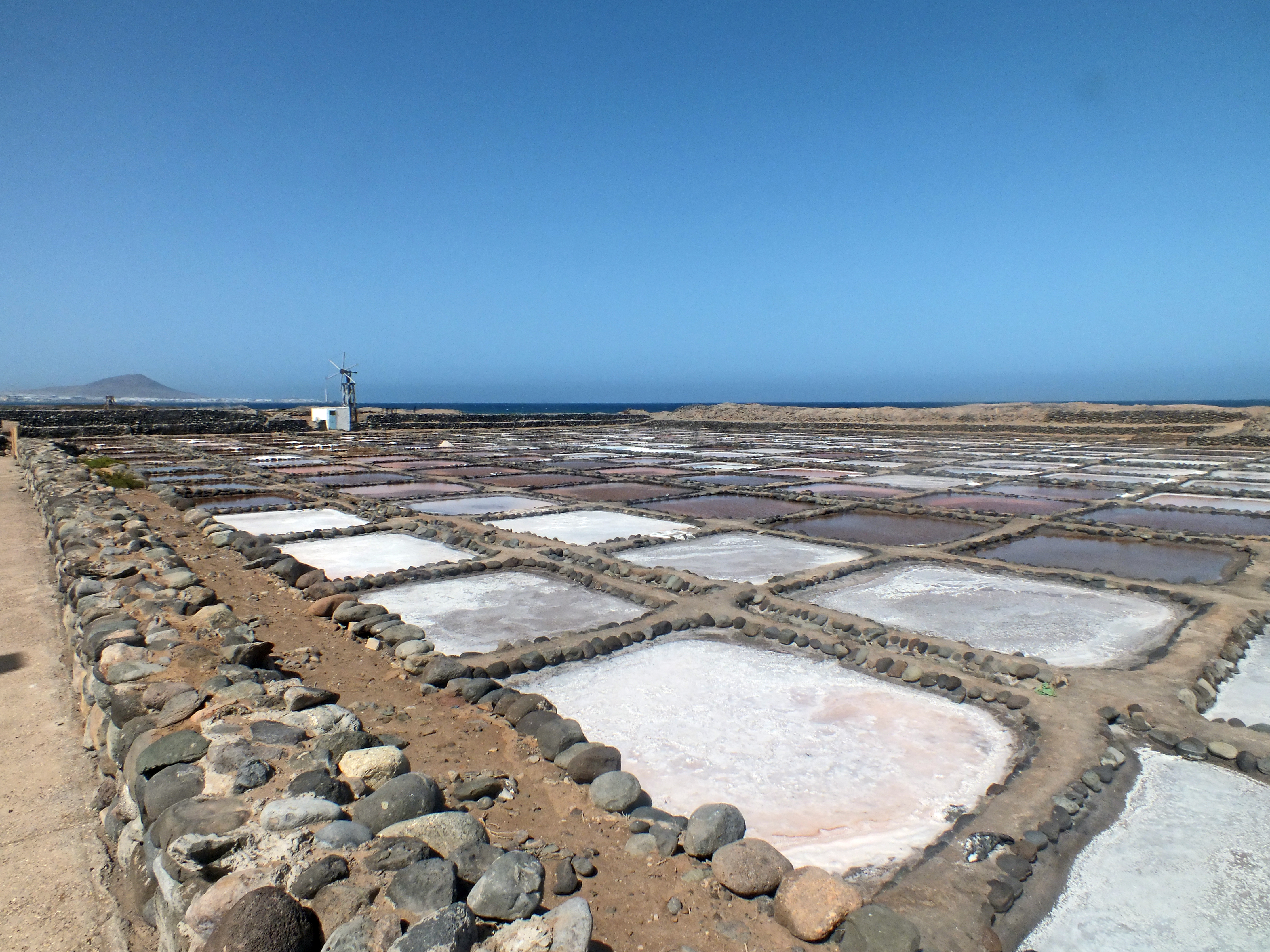 Salzgarten aus dem 18. Jahrhundert, noch heute in Betrieb